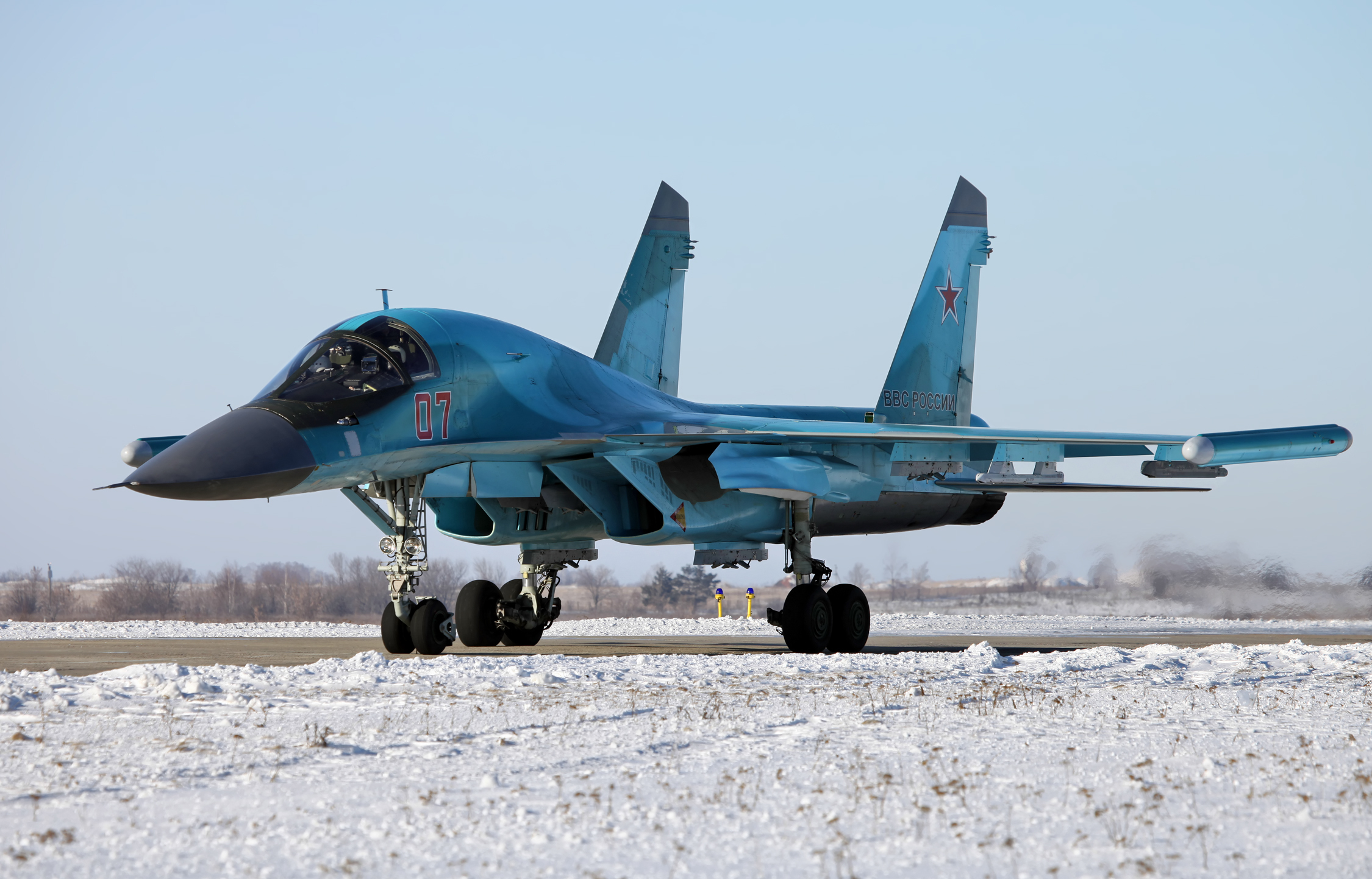 Су-34 бортовой номер 07 Красный (Su-34 07 Red)